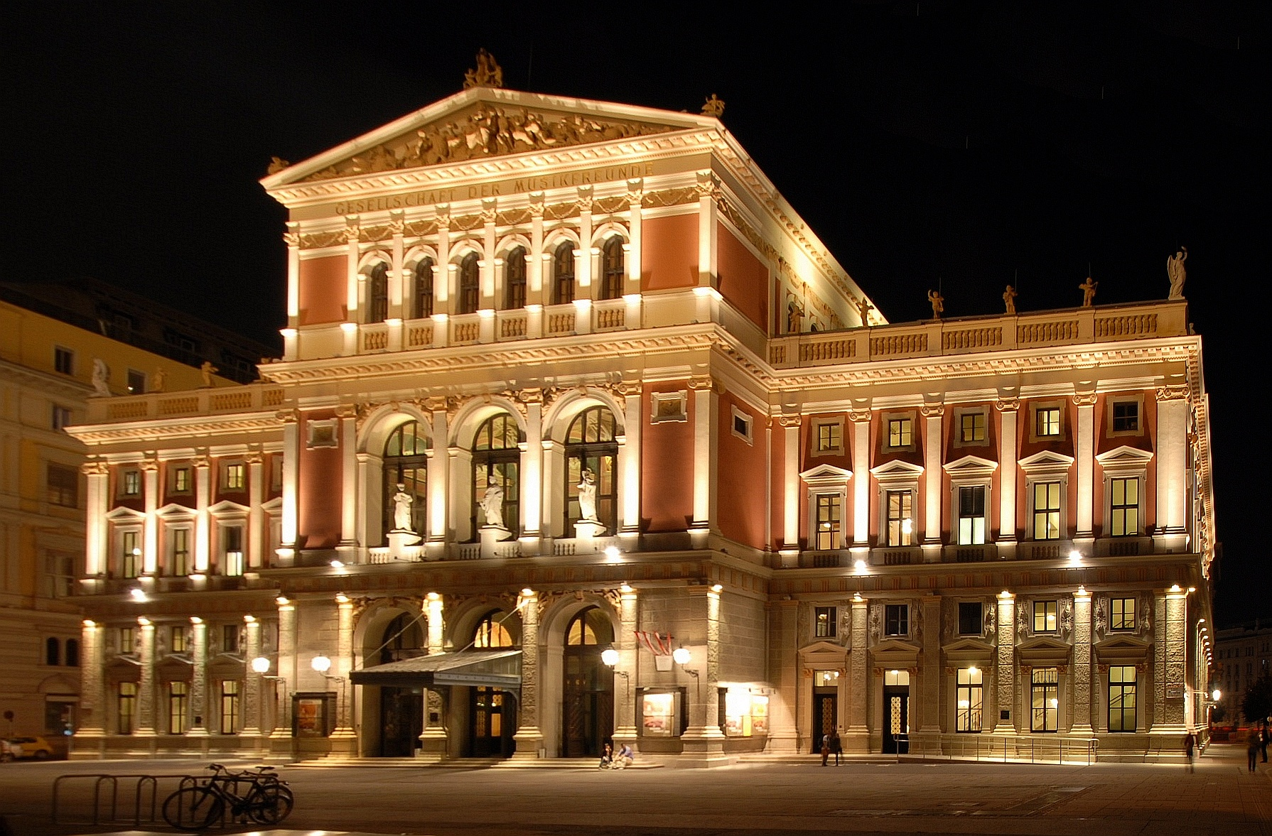 Musikverein